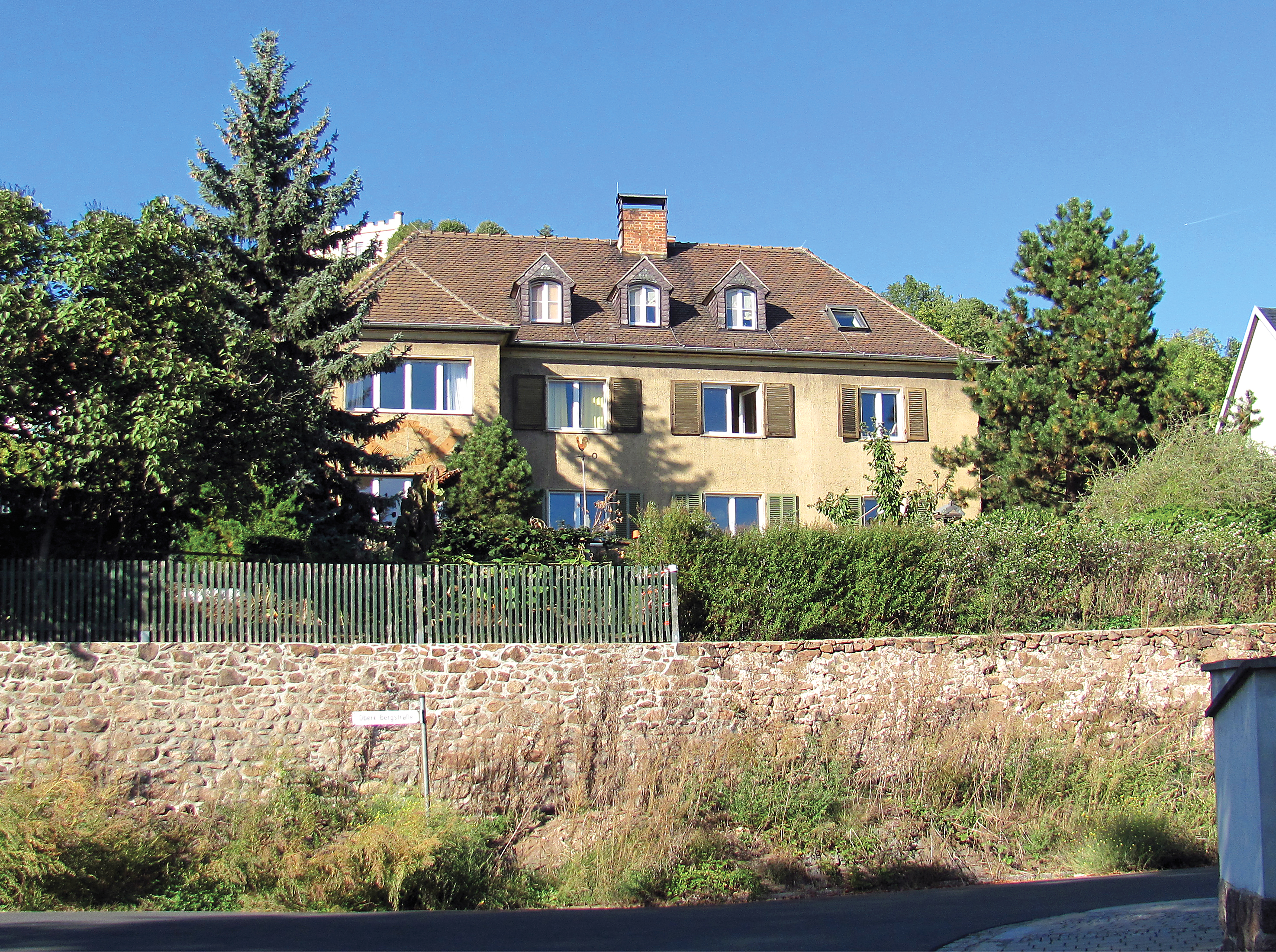 Radebeul, Zweifamilienhaus Heinrich Wentzel